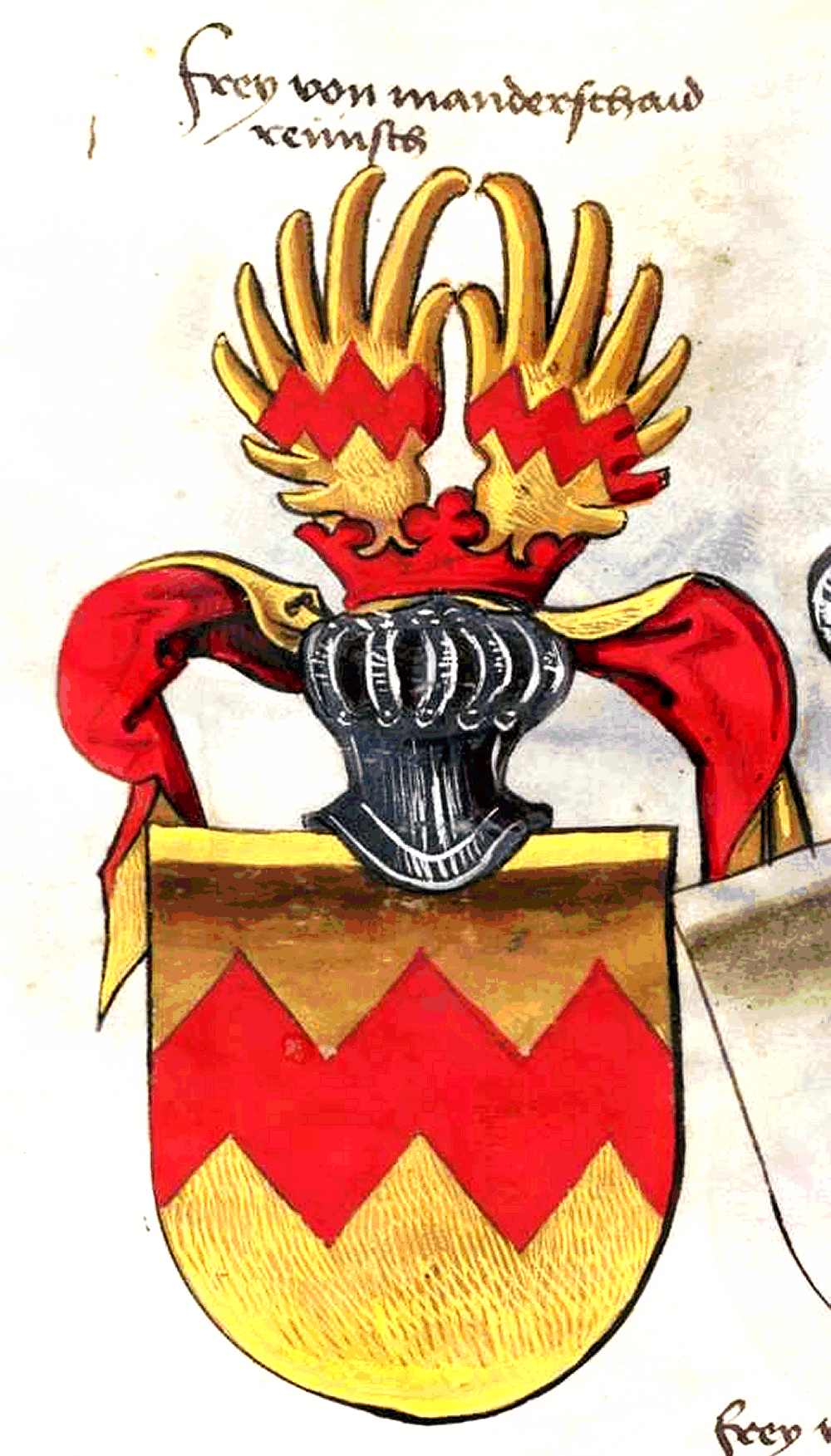 Wappen derer von Manderscheid